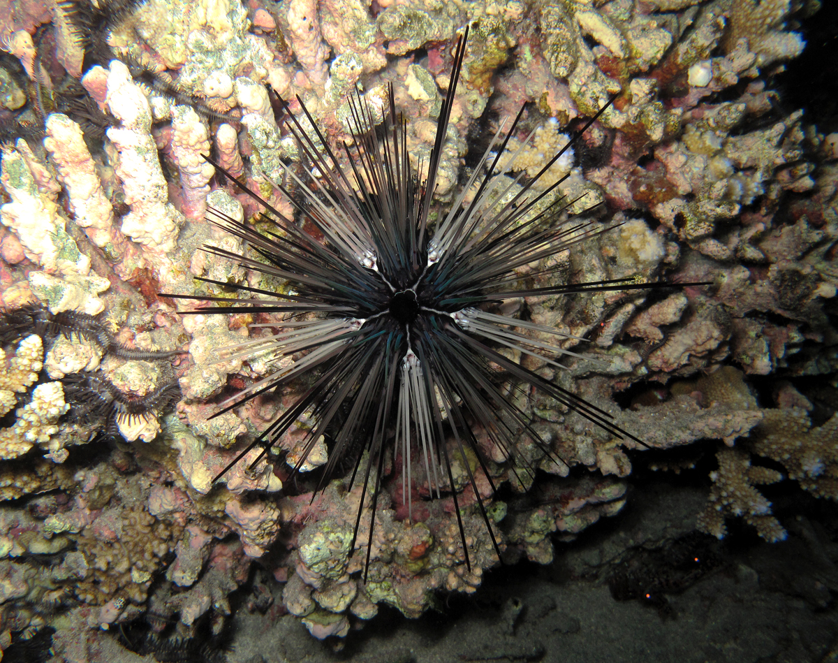 Oursin Diadema savignyi à la robe bicolore (à la Réunion).